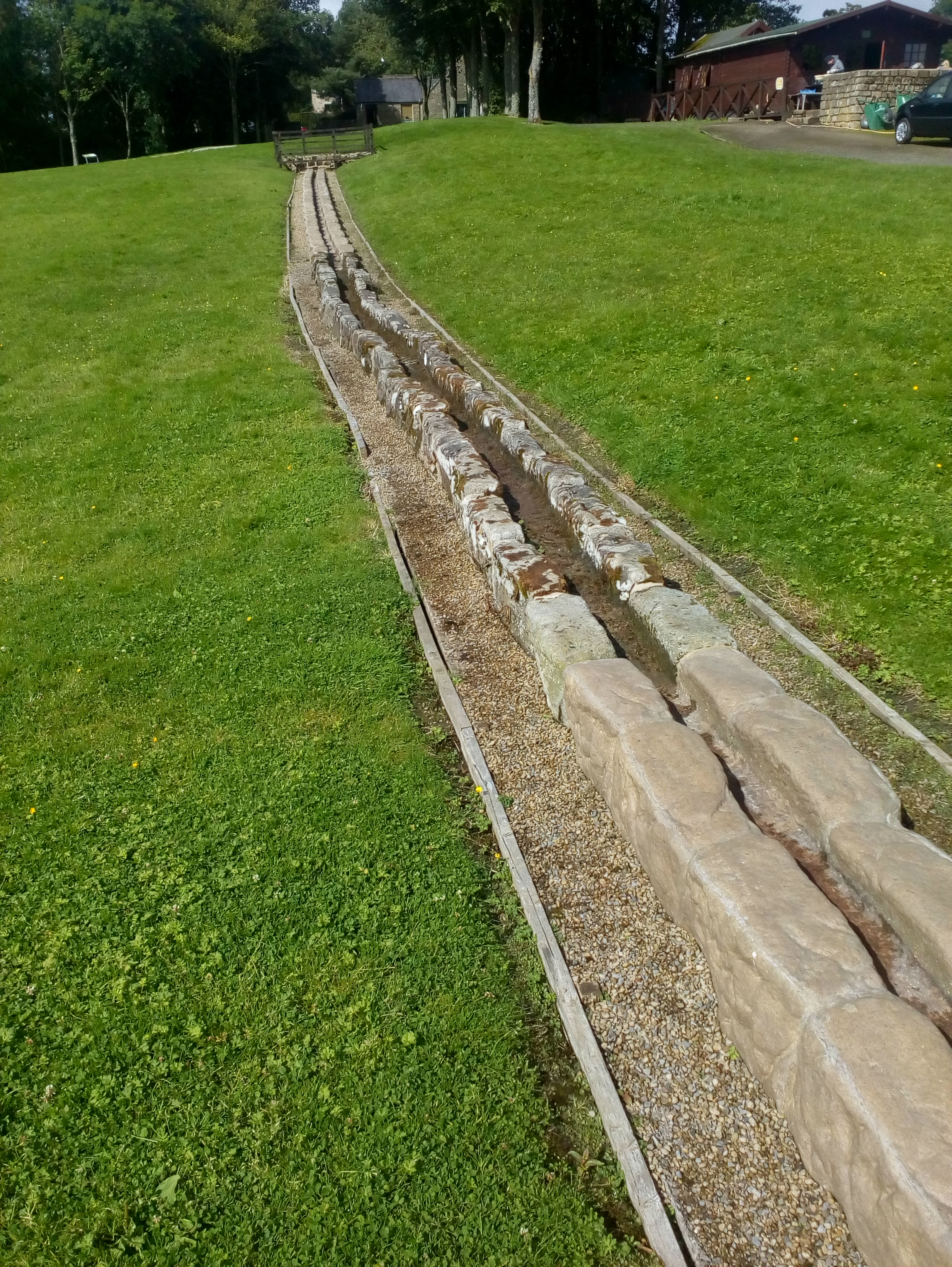 Vindalanda 2017